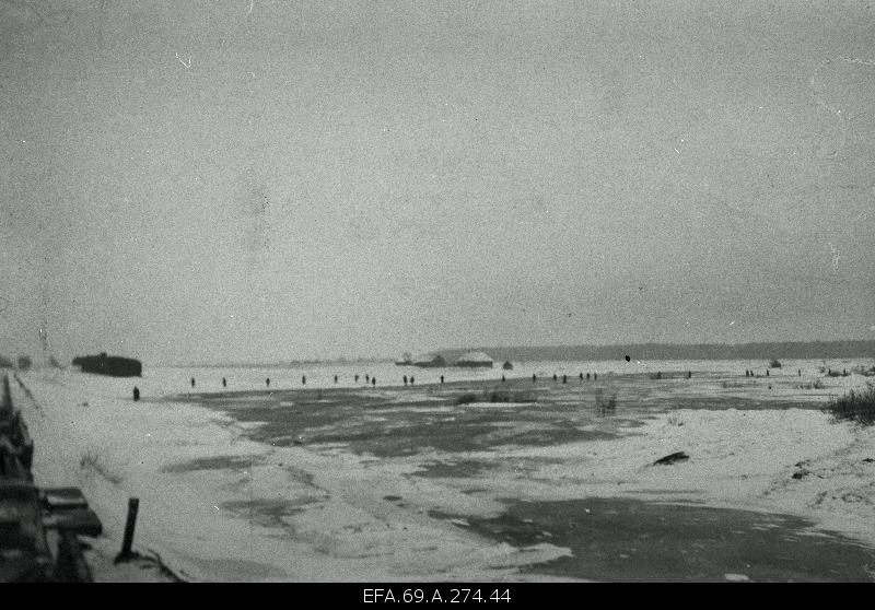 Vabadussõda. Soomusronglased ja kuperjanovlased (paremal raudteest) 14. jaanuaril 1919 pealetungil Tartu vallutamiseks. Pildistatud tegevuse ajal laiarööpmelise soomusrongi nr 1 suurtükiplatvormilt soomusrongi ülema kapten Anton Irve poolt.